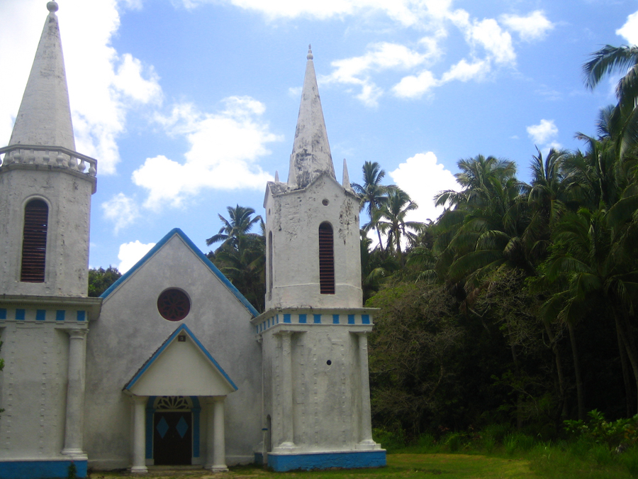 Die Kirche Notre-Dame de la Paix auf Akamaru, Gambierinseln